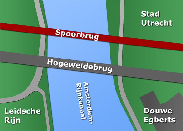 Situatieoverzicht vervanging Vleutensebrug door Hogeweidebrug